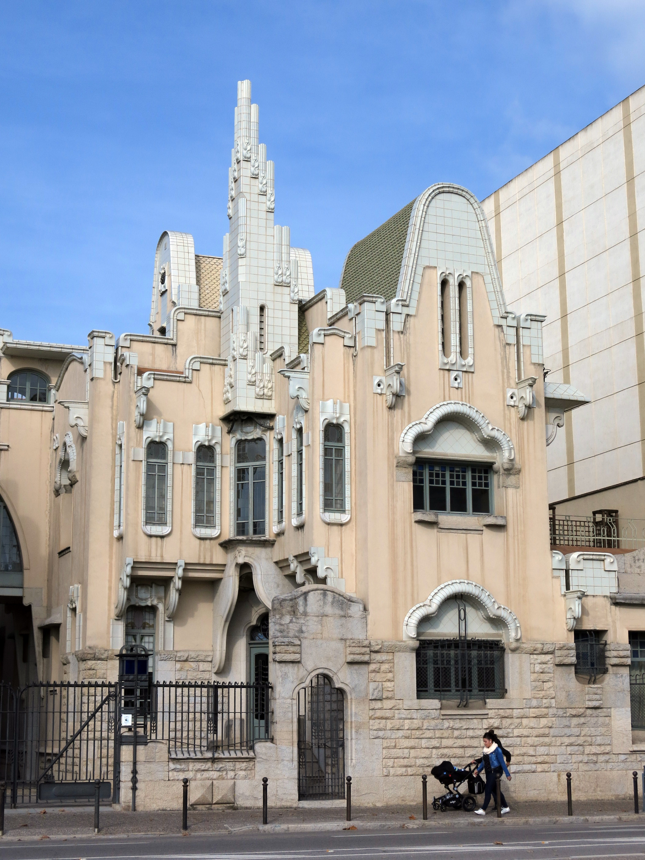 Farinera Teixidor (Girona)